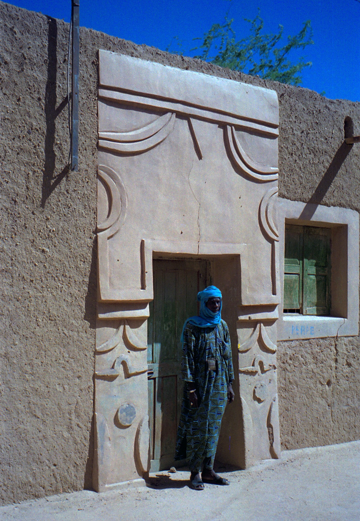 A building in Agadez, Niger. 1997.1997 #278-22 Agadez